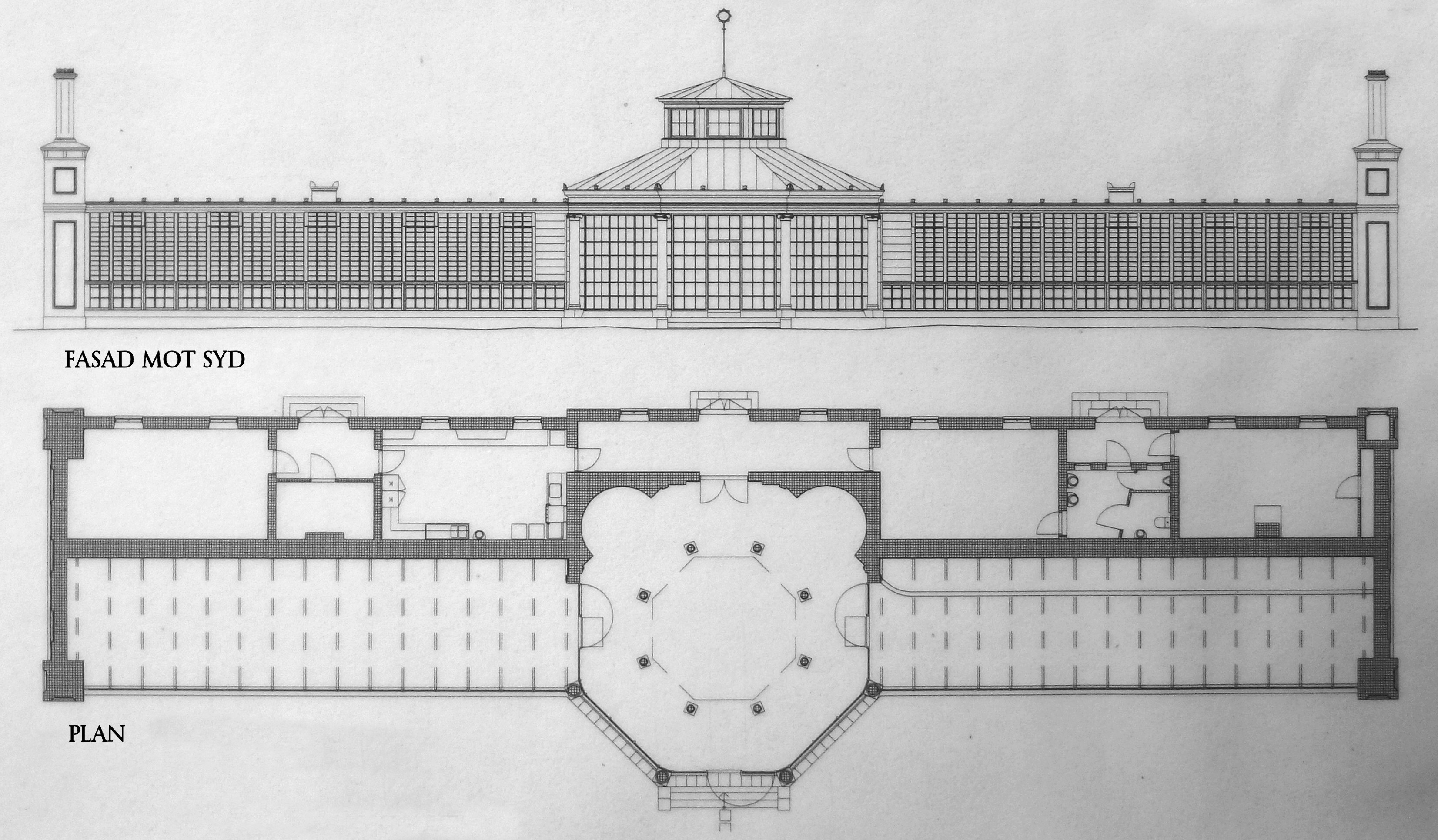 Tullgarn orangeriet plan fasad, ritningar